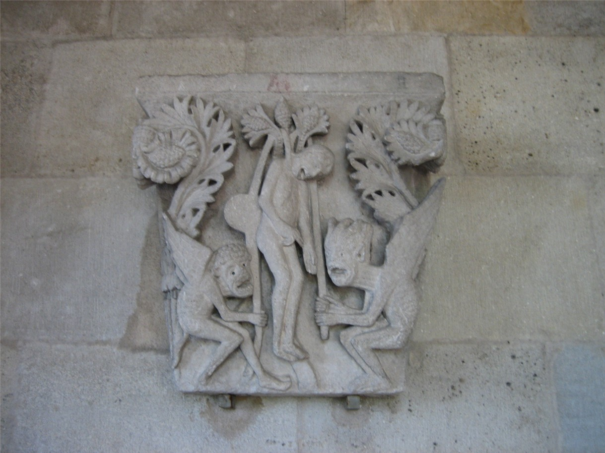 Chapiteau dans la salle capitulaire de la cathédrale Saint-Lazare d'Autun, Saône et Loire, représentant la pendaison de Judas